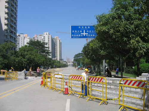 深圳地鐵2號線施工現場